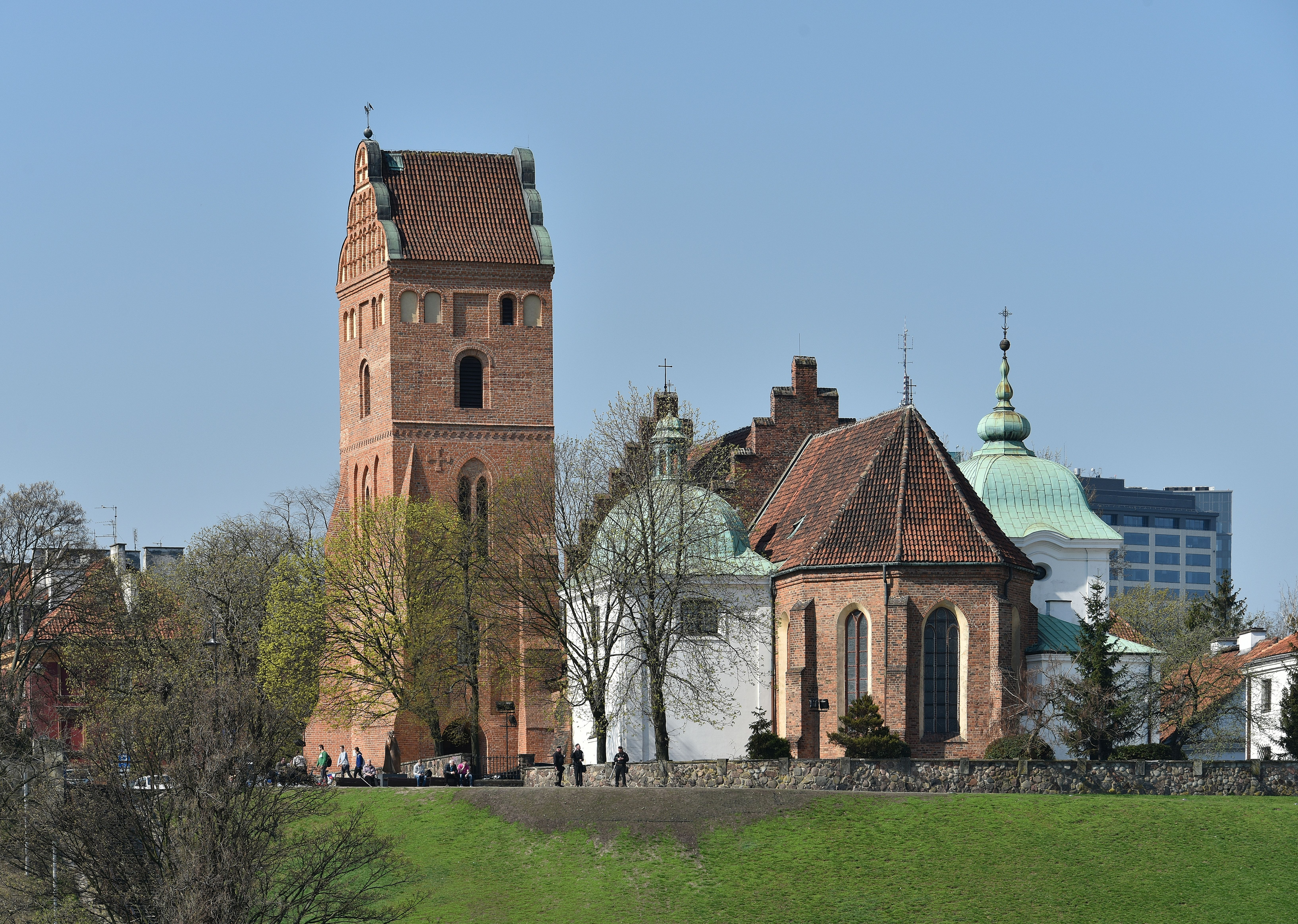 Kościół Nawiedzenia Najświętszej Marii Panny w Warszawie, widok od strony wschodniej